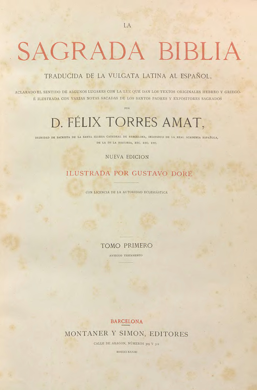 / traducida de la Vulgata latina al español, aclarado el sentido de algunos lugares con la luz que dan los textos originales hebreo y griego ; é ilustrada con varias notas sacadas de los santos padres y expositores sagrados por Félix Torres Amat ... ; ilustrada por Gustavo Doré ; tomo primero [-cuarto]Más detallesEDICIÓNNueva ediciónPUBLICACIÓNBarcelona : Montaner y Simón, 1883-1884DESCR. FÍSICA362 col., 47 p. ; 390 col., 52 p. ; 722 col., 86 p. ; 420 col., p. 424-459, 52 : il., grab. ; 39 cmNOTAEn port.: Antiguo TestamentoDESCR. FÍSICAAnteportada en cada tomo con el tít. "La Sagrada Biblia" y la indicación del número del tomoILUSTRACIONESPort. a dos tintasNumerosas h. de grab. intercaladas en el textoSubjectBibliaOTRO AUTORTorres Amat, Félix, 1772-1847Doré, Gustave, 1832-1883CLASIF. ABREV.22LUGAR IMPRES.España BarcelonaSIGNATURAA I/156 A I/157A I/158A I/159 Tomo cuarto Catálogo Fama